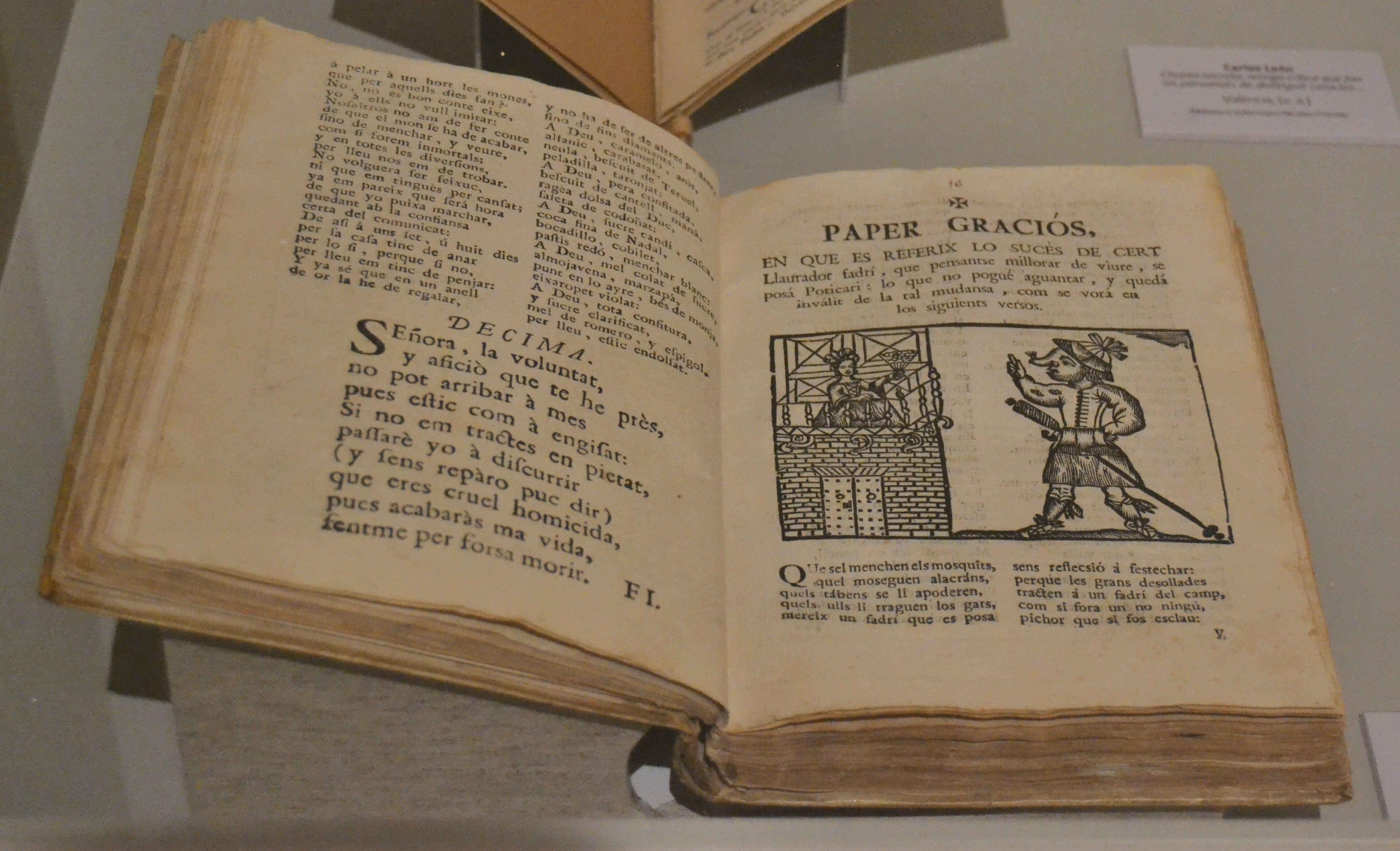 Paper Graciós, en que es referix lo suces de cert llaurador fadrí de Carles Ros, Biblioteca Valenciana